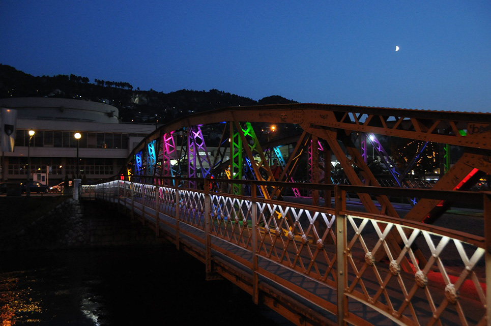 Eiffel Bridge on Miljacka River